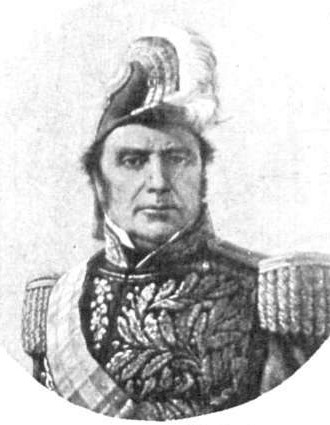 Retrato fotográfico del Gral. Justo José de Urquiza (1801-1870) caudillo entrerriano. Venció a Rosas en Caseros, y fue Presidente de la Confederación Argentina entre 1854 y 1860.